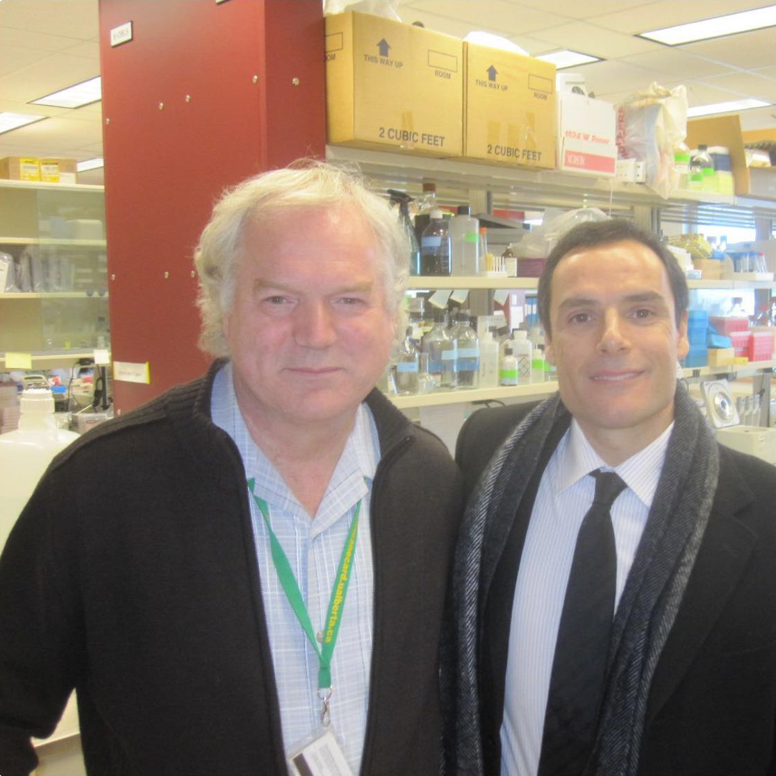 Humberto Silva (dir.) com Dr. Michael Houghton, médico americano que descobriu o vírus da hepatite C.